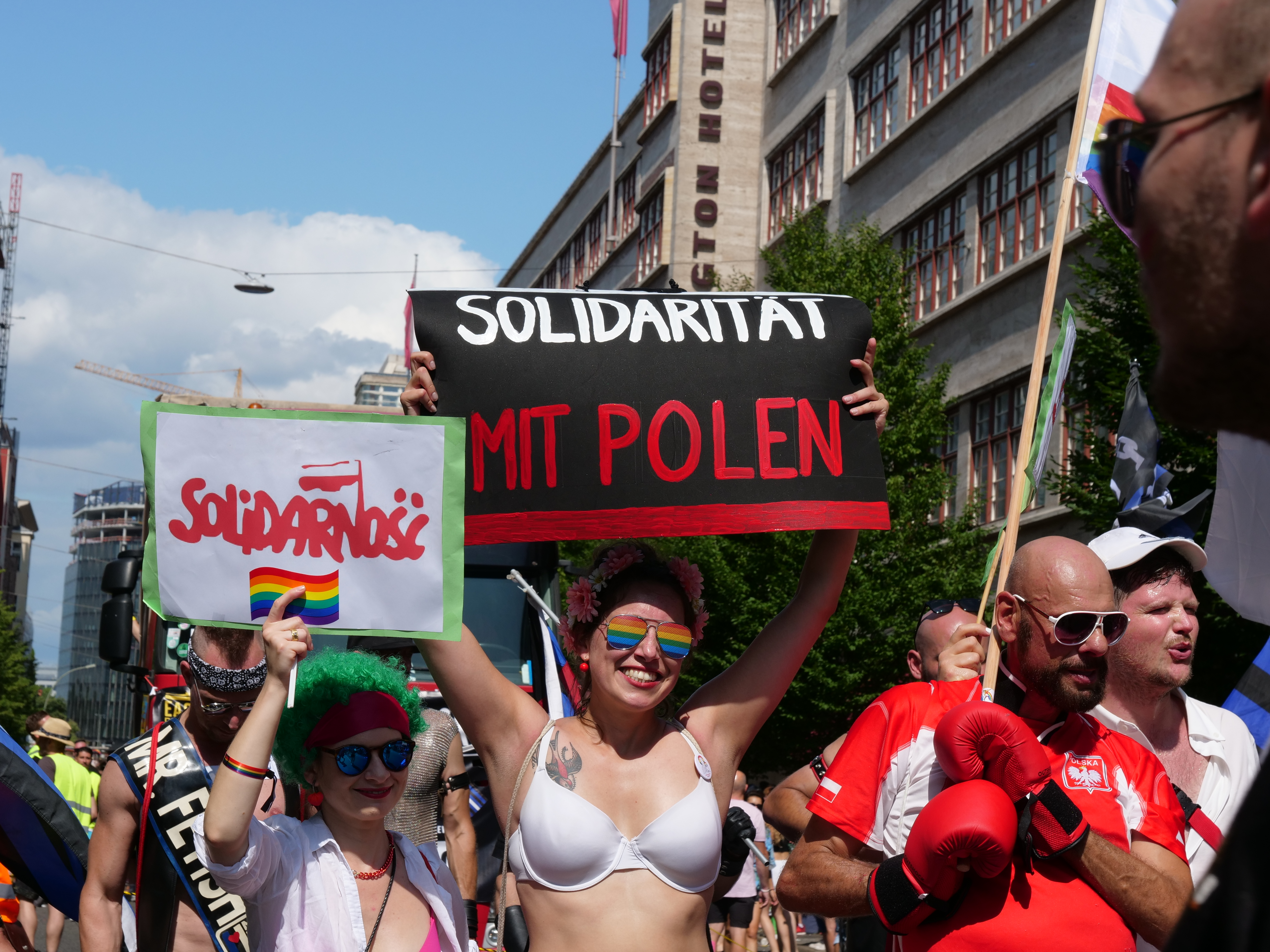 Christopher Street Day am 27. Juli 2019 in Berlin.